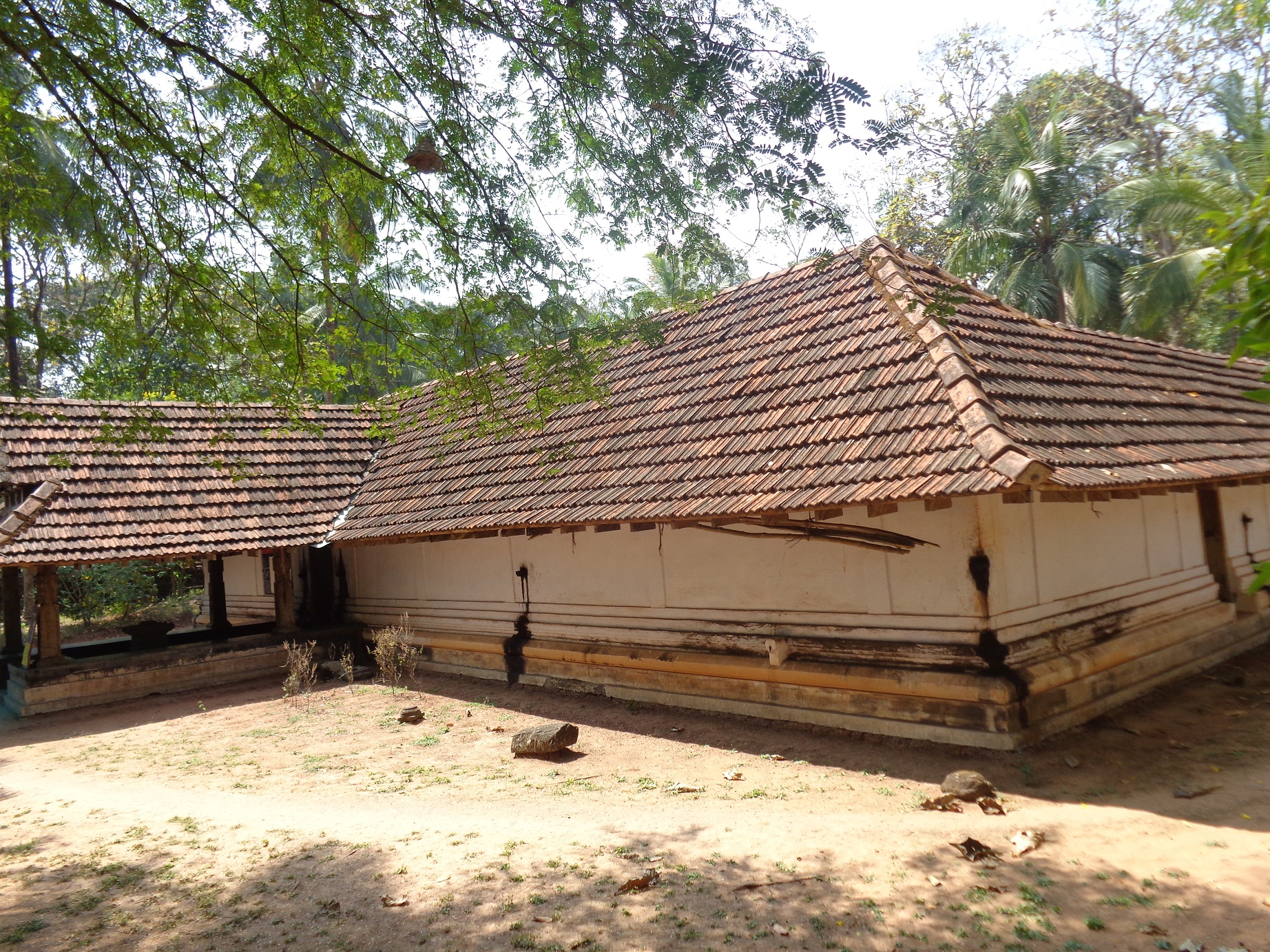 പൂത്രക്കോവ് ക്ഷേത്രം ഒരുകാഴ്ച